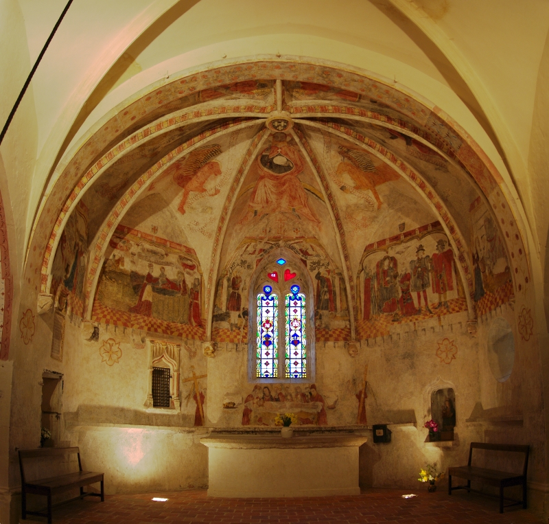 La chapelle du Chatelard, Ain Peintures murales du XVème siècle Inscription à l’inventaire supplémentaire des monuments historiques depuis le 22 janvier 1979.